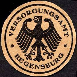 Sealing stamp Title: Versorgungsamt - Regensburg Description: Briefsiegel, hellbraun, schwarz Place: Regensburg size: 3 cm